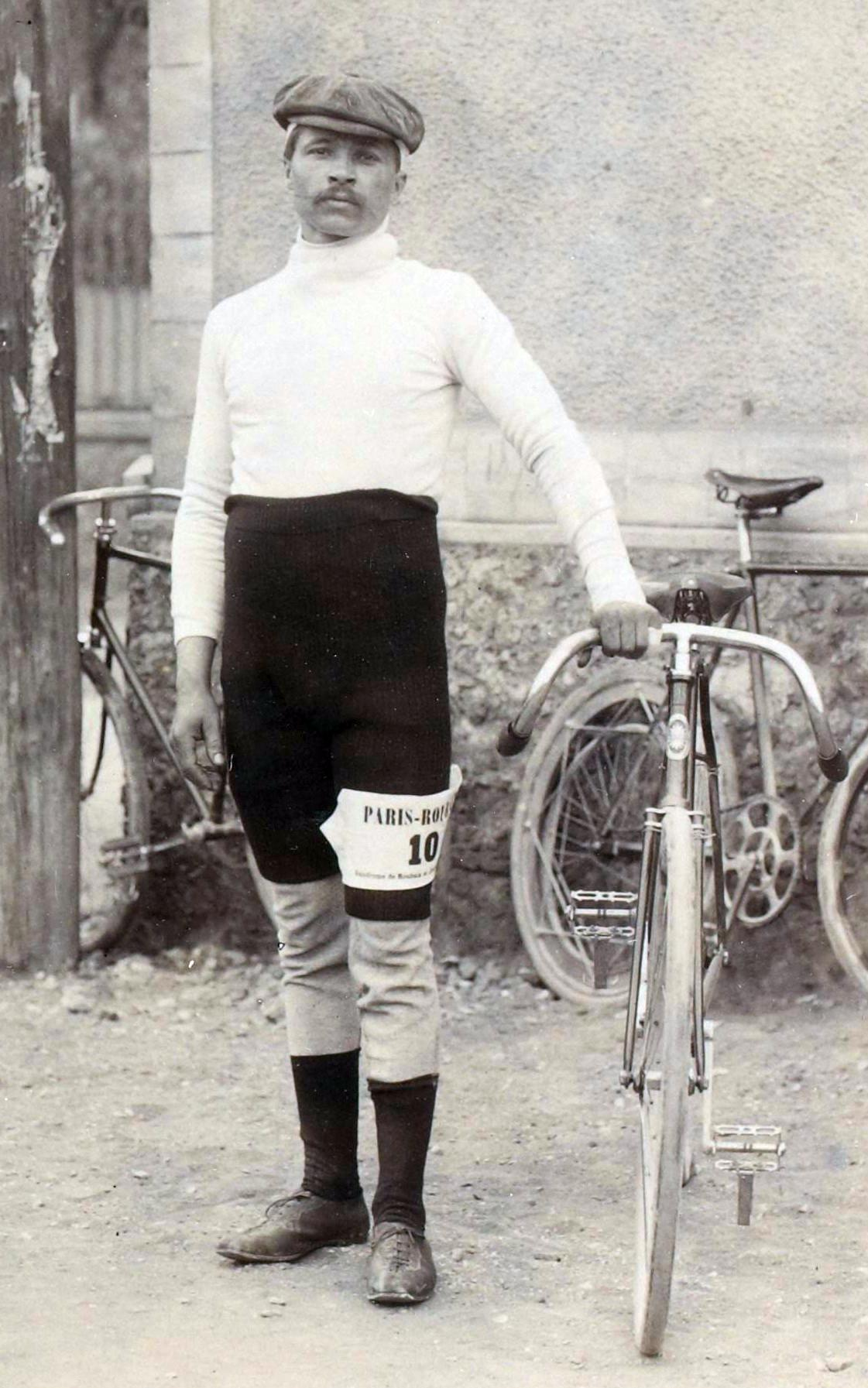 [Collection Jules Beau. Photographie sportive] : T. 6. Année 1898 / Jules Beau : 3 avril 1898 ; Maurice Garin